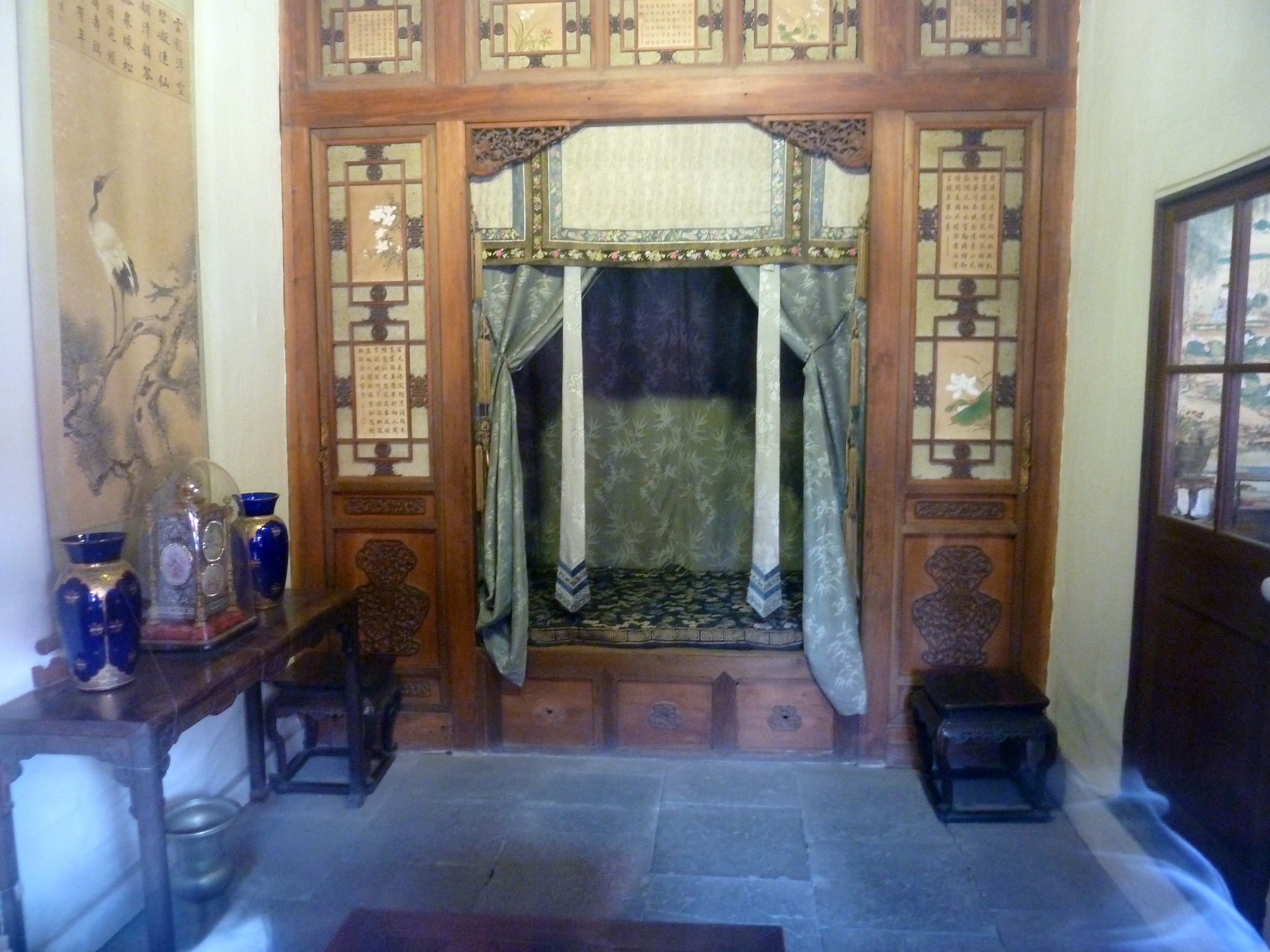 Dans la Cité_interdite, à Pékin .-, Chine